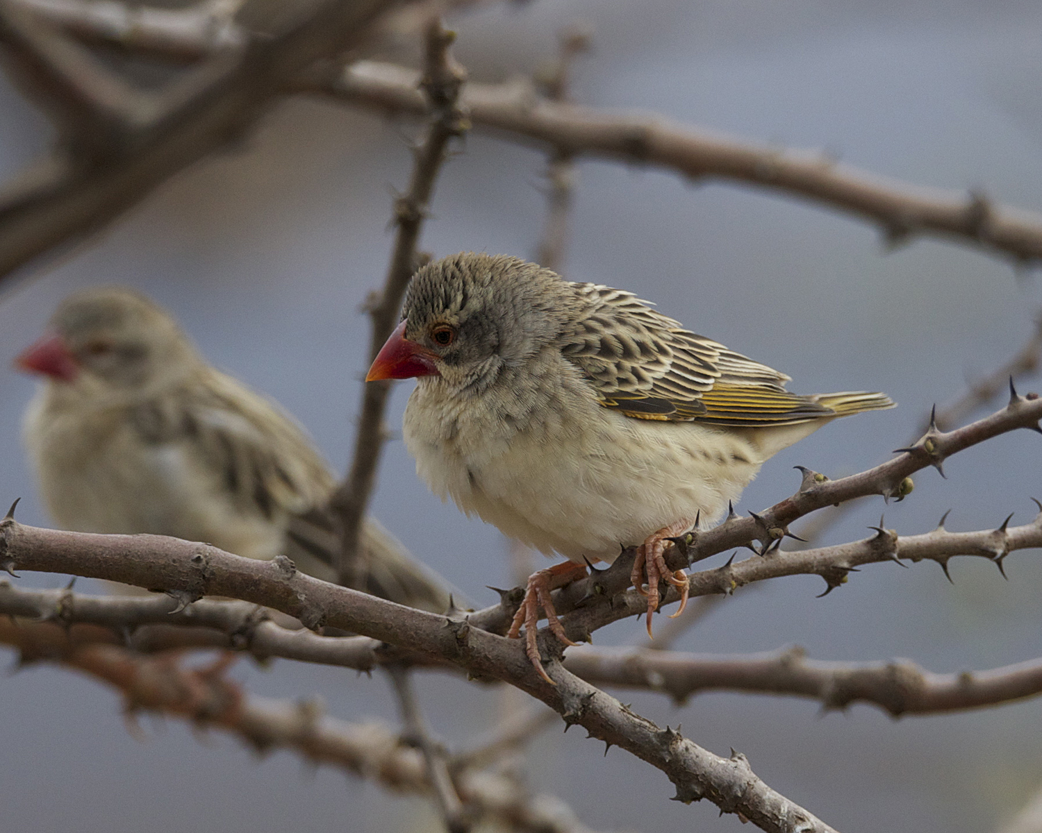 Kambi ya Tembo, Tanzania 2nd. September 2012 CF2P1406